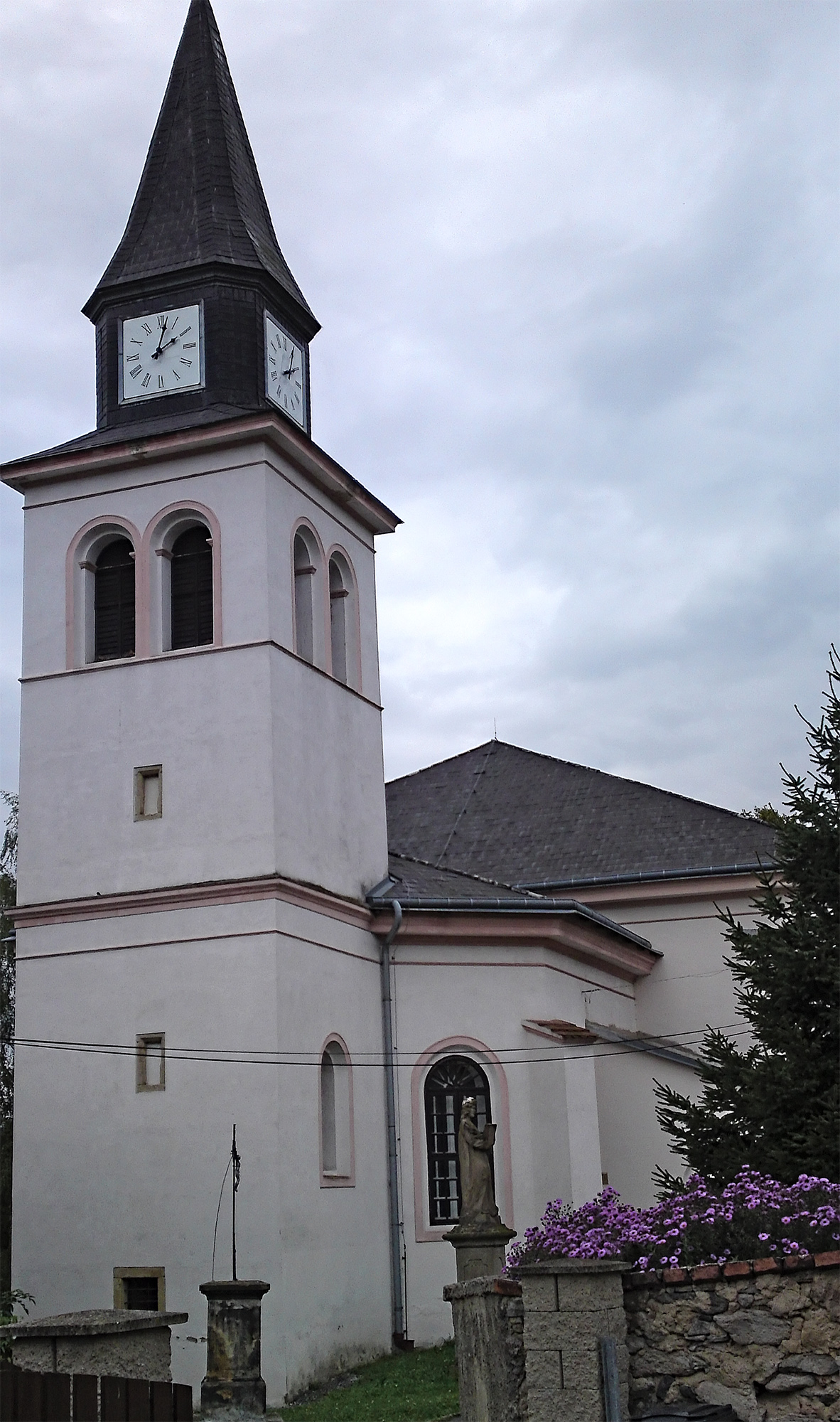 Kostel sv. Šimona a Judy (Mojžíř), ?, Mojžíř